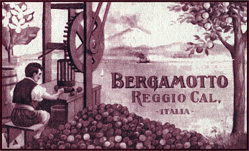 vecchia etichetta, illustrazione ottocentesca